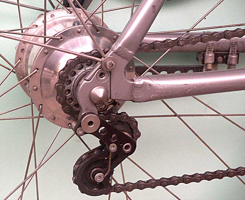 Rohloff Speedhub